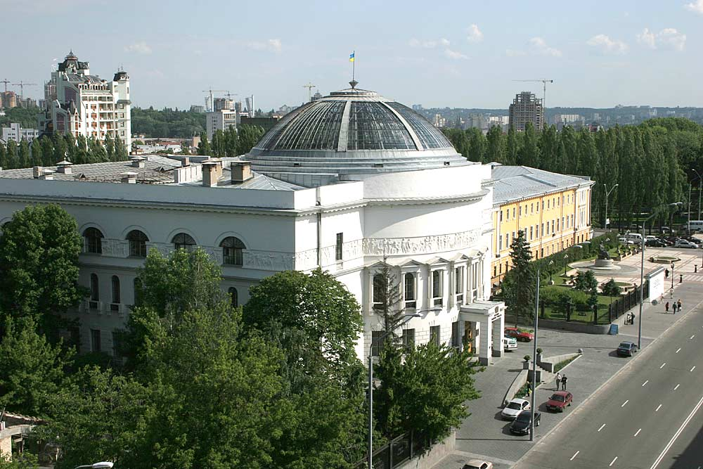 Будинок вчителя (у минулому Педагогічний музей). Київ